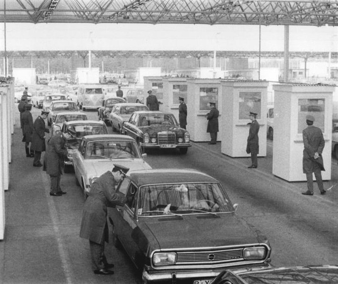 ADN-ZB Reiche-31.3.1972- Berlin: Zeitweilige regelung in Kraft Die Geste des guten Willens der DDR führte auch am 30. und 31. März 1972 zu einem regen Besucherverkehr an den Grenzübergangsstellen zur DDR und ihrer Hauptstadt.UBz: Zügig und korrekt erfolgt an den Grenzübergangasstellen Drewitz bei Potsdam die Abfertigung der Transitreisenden und der in die Südbezirke der DDR reisenden Westberliner Bürger.